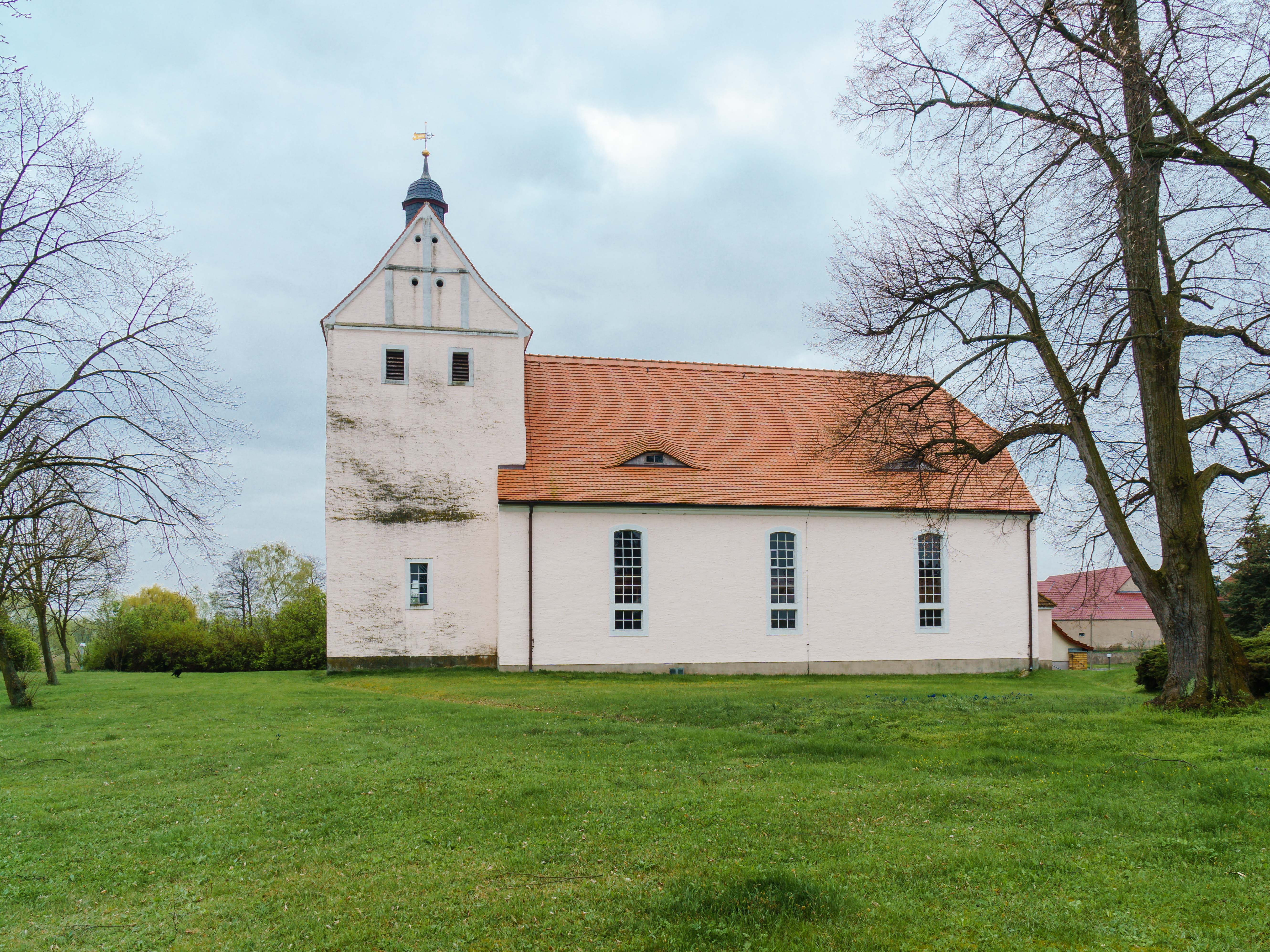 Kirche, Pfarrweg 2 in Cavertitz OT Schirmenitz